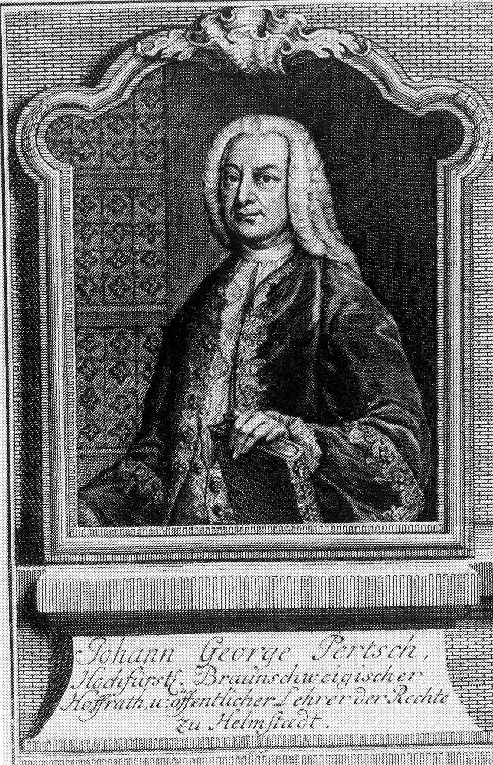 Johann Georg Pertsch (1694–1754), Professor an der Universität Helmstedt.